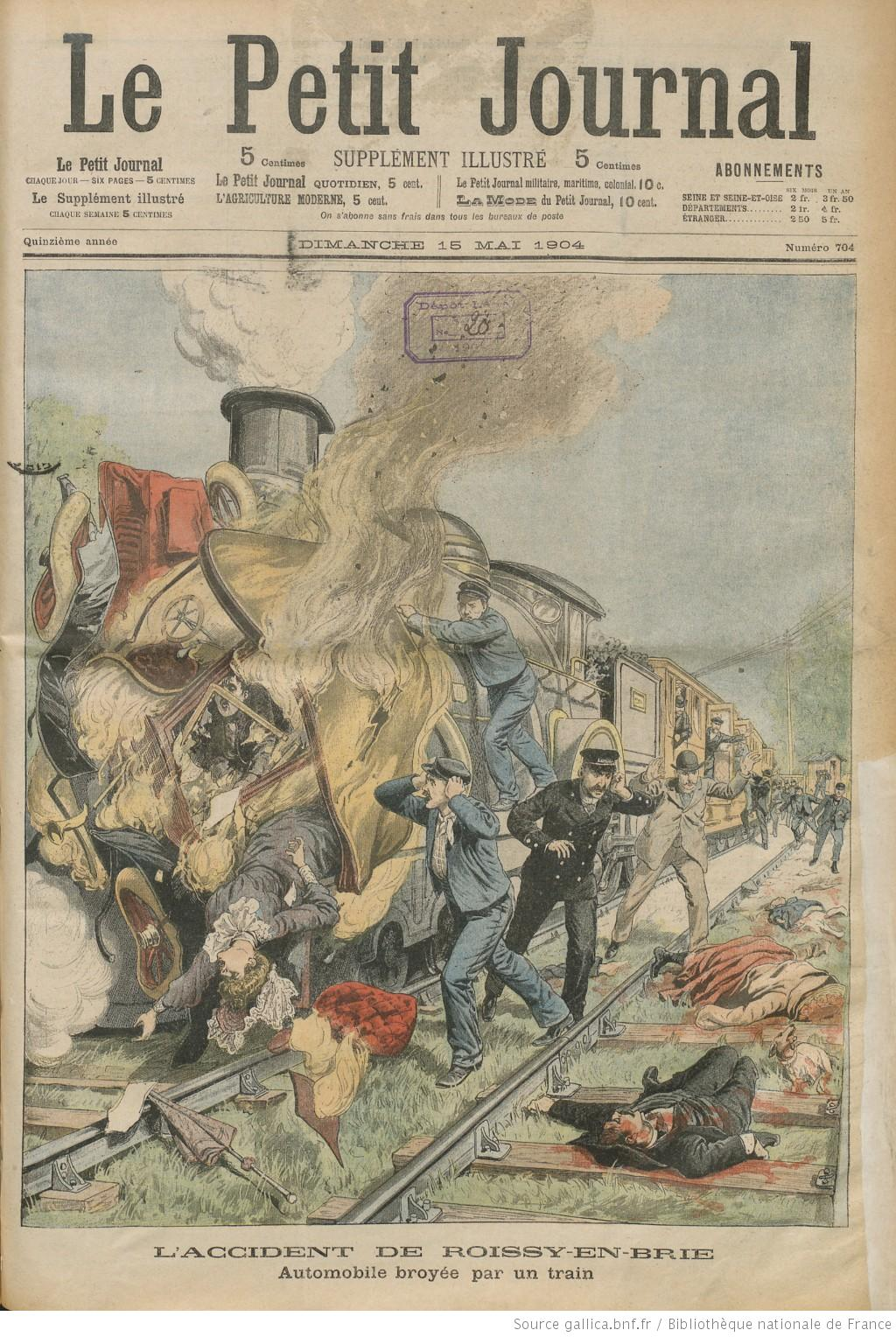 L'accident au passage à niveau de Roissy-en-Brie reconstitué par les dessinateurs du Petit Journal (supplément illustré du dimanche)